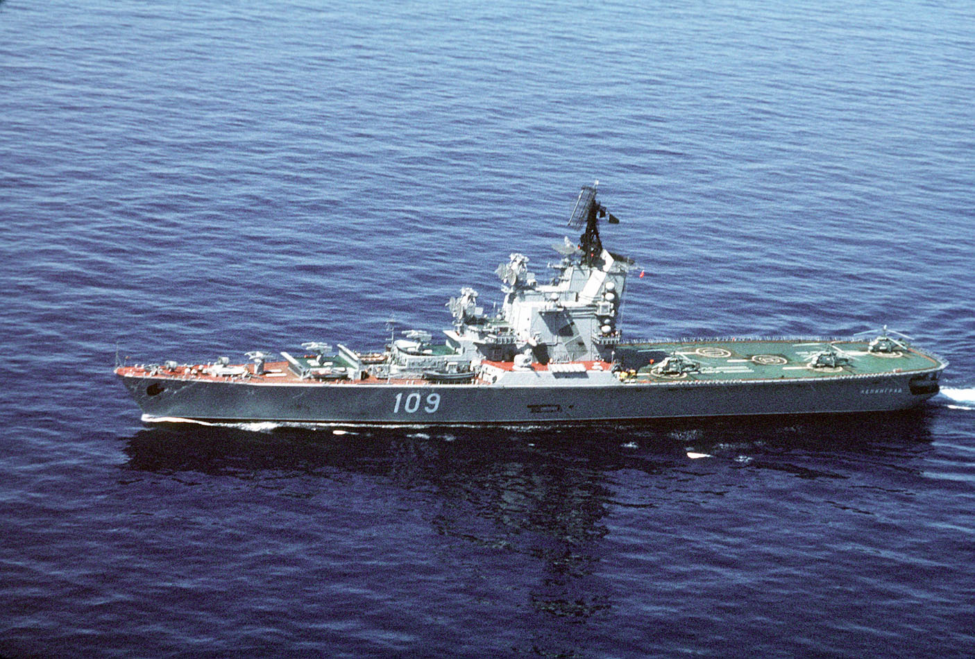 Soviet helicopter carrier